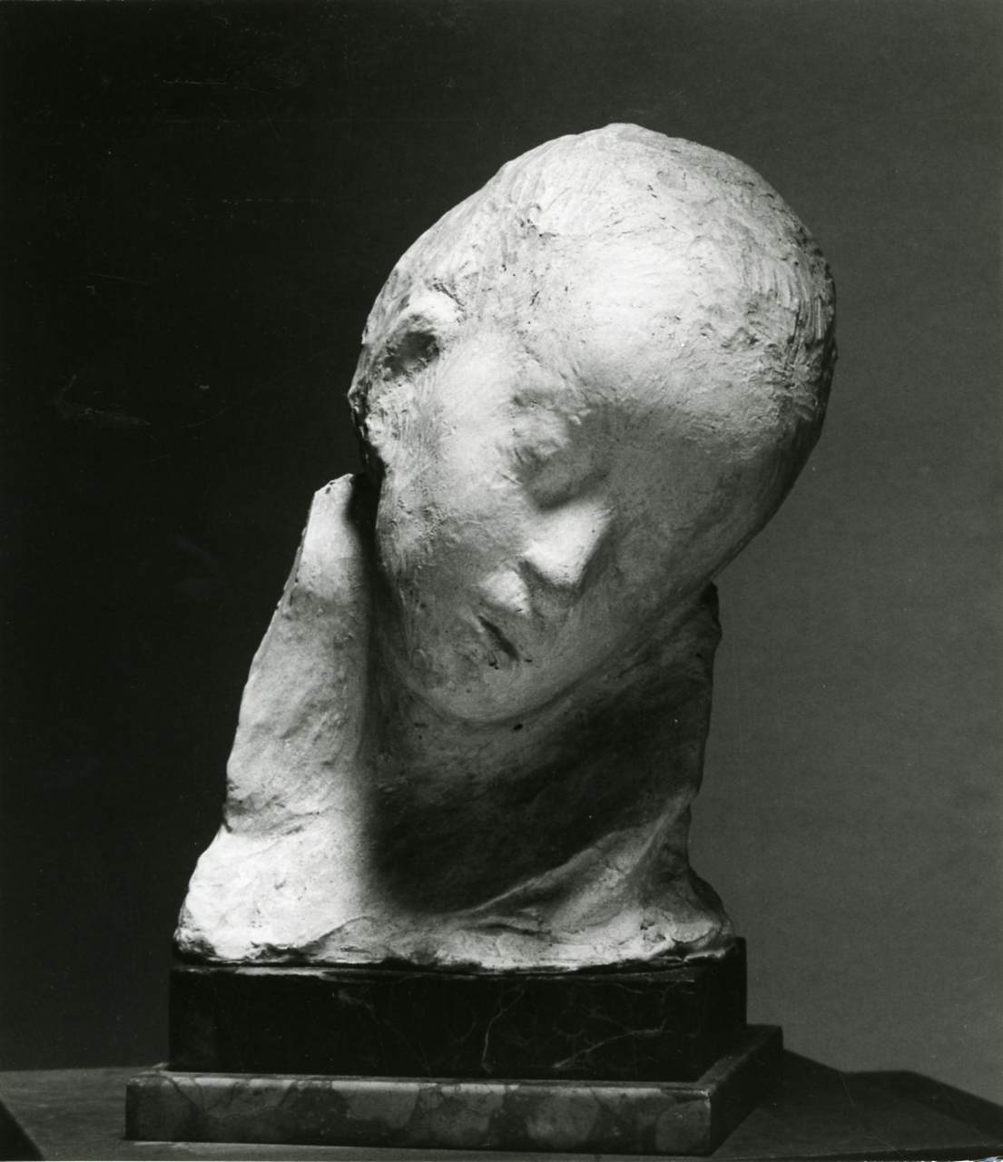 Servizio fotografico : Milano, 1978 / Paolo Monti. - Stampe: 2 : Positivo b/n, gelatina bromuro d'argento/ carta, 24x24. - ((Al verso delle stampe manoscritto numero di negativo corrispondente: 3136/4, 3190/15. Sul coperchio della scatola manoscritto a pennarello nero: "Medardo Rosso". - Occasione: Documentazione per la pubblicazione del catalogo: "Medardo Rosso, 1858-19" , Ed. Der Kunstverein, 1984. - Fonte: Agenda di Paolo Monti: Nikon Leika 3001-/ Monti 1978 (1978-1982), presso Archivio Paolo Monti